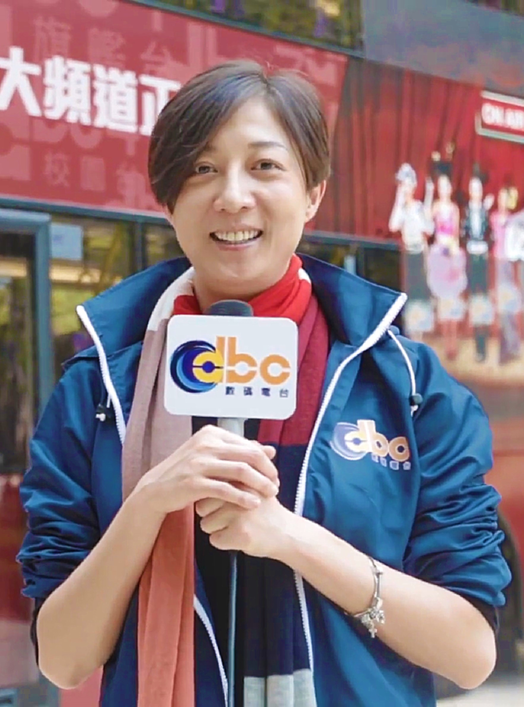 中文（香港）: 香港女藝人，曾為1990年亞洲小姐競選冠軍，從1999年與成龍發生性關係開始，到女兒長大後的生活，都一直成為傳媒焦點